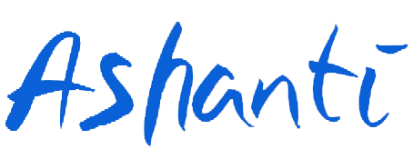 Logotyp för den amerikanska artisten Ashanti